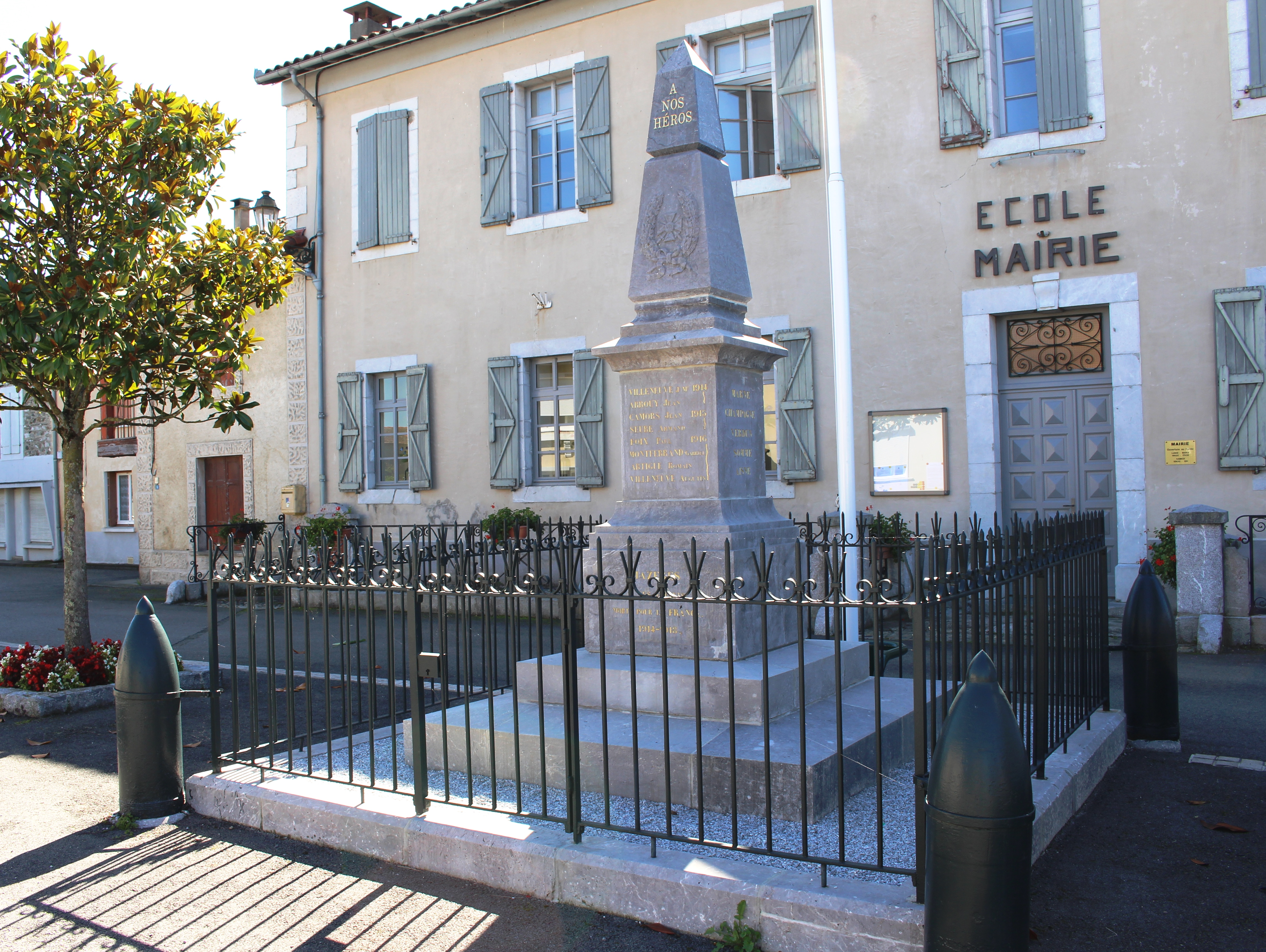 Monument aux morts de Mazères-de-Neste (Hautes-Pyrénées)